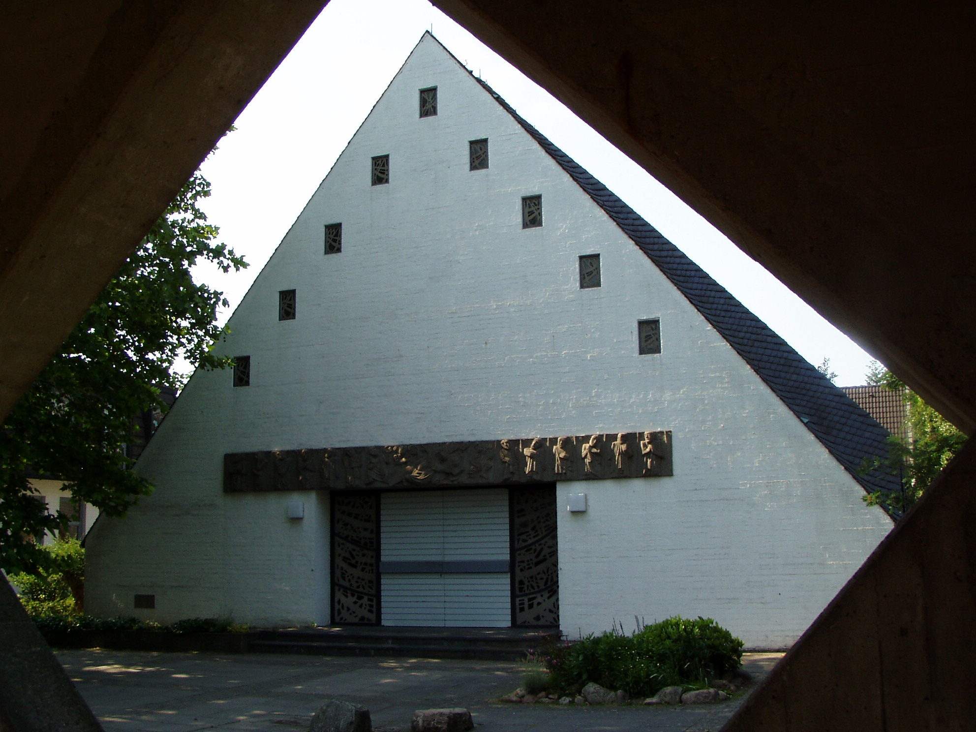 Luke church at Hamburg-Sasel, Germany